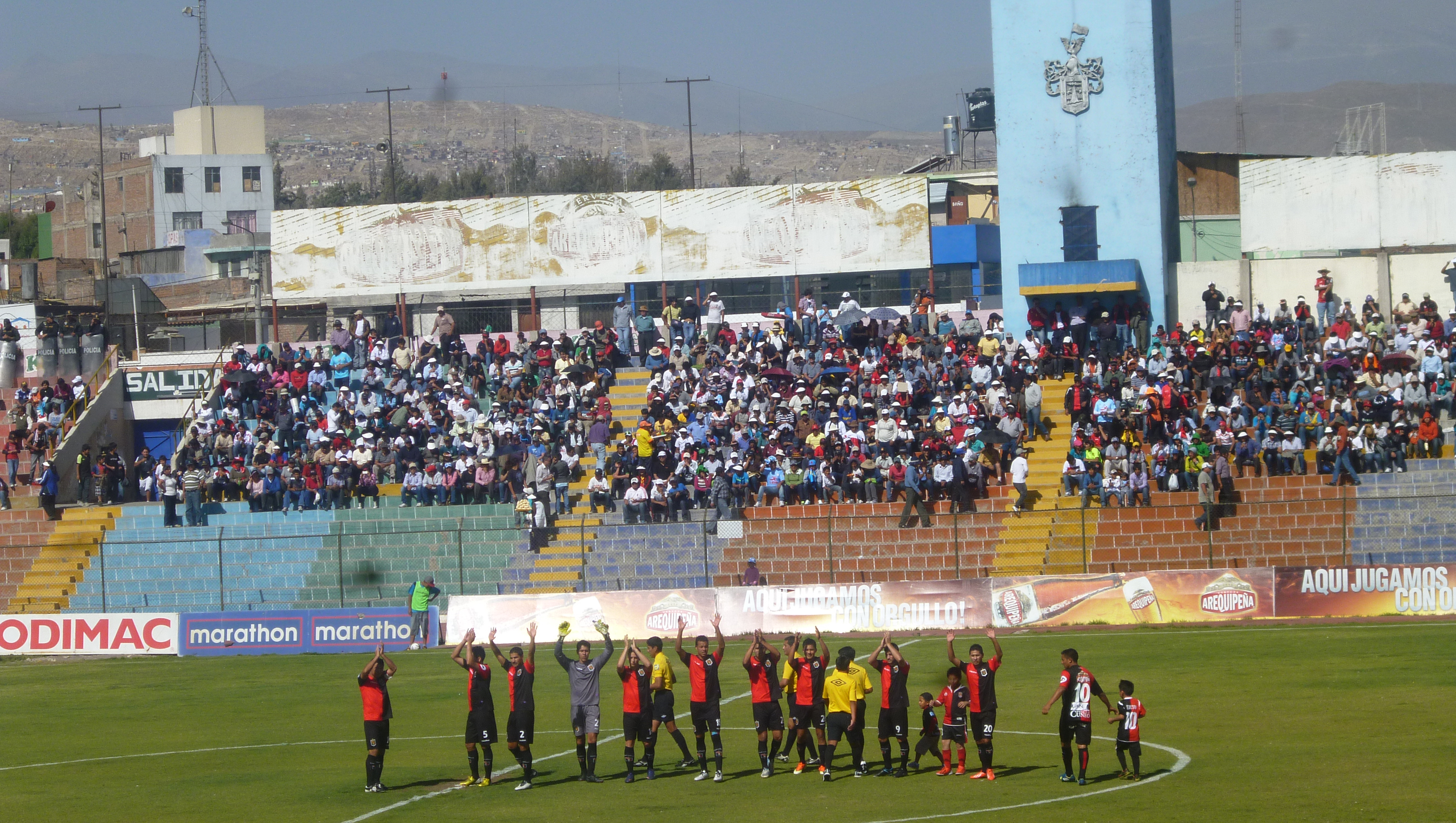 Plantel del FBC Melgar saludando al publico en el Estadio Mariano Melgar.